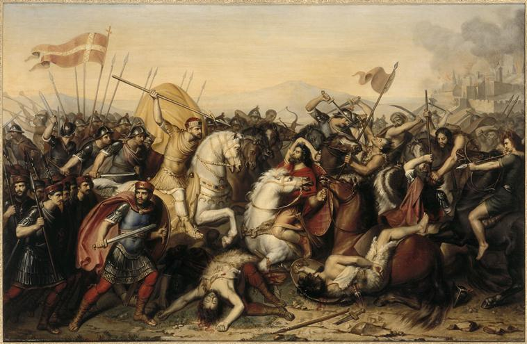 huile sur toile